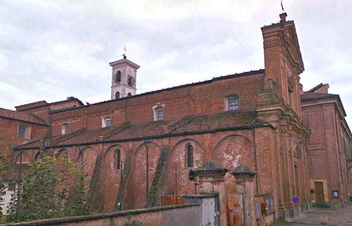 prospettiva del complesso abbazia di Casanova di Carmagnola (TO)